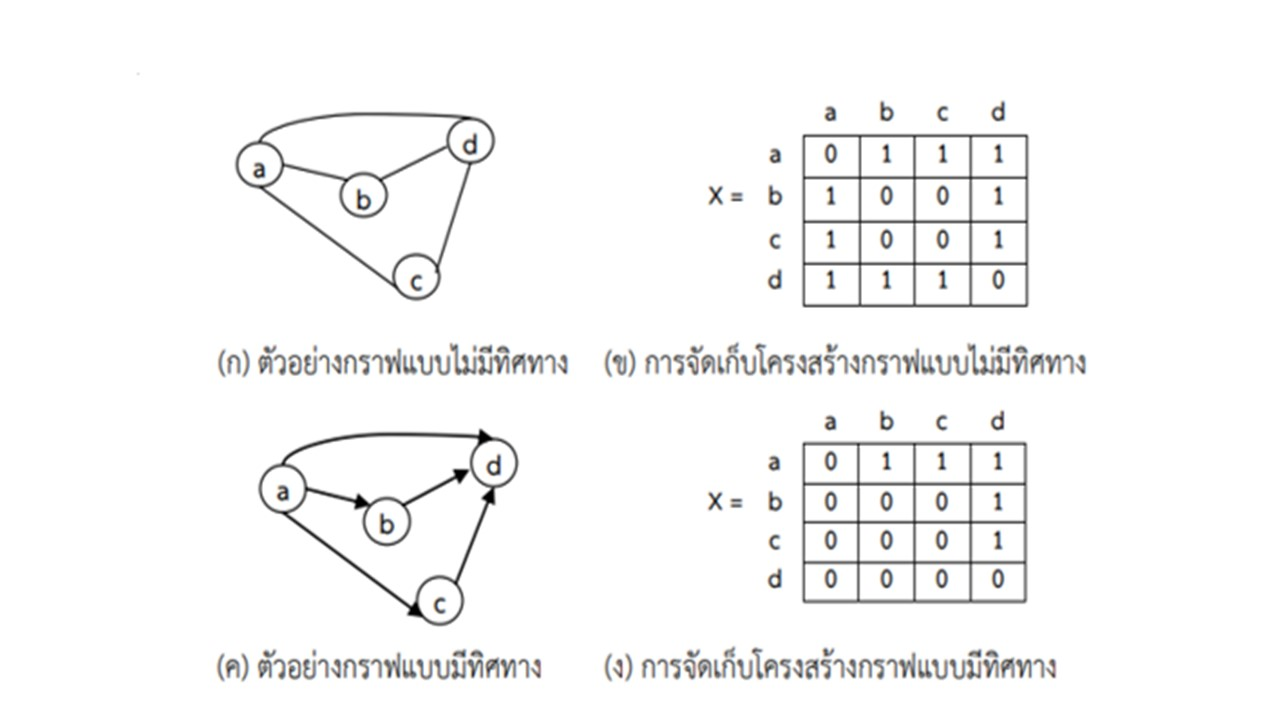 การจัดเก็บโครงสร้างกราฟ